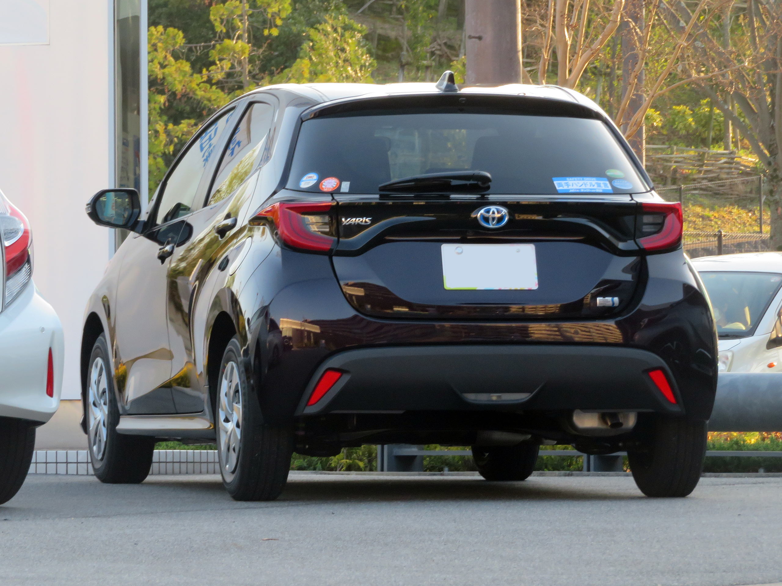 6AA-MXPH10-AHXGB型トヨタ・ヤリスHYBRID G 2WDをリアから撮影。